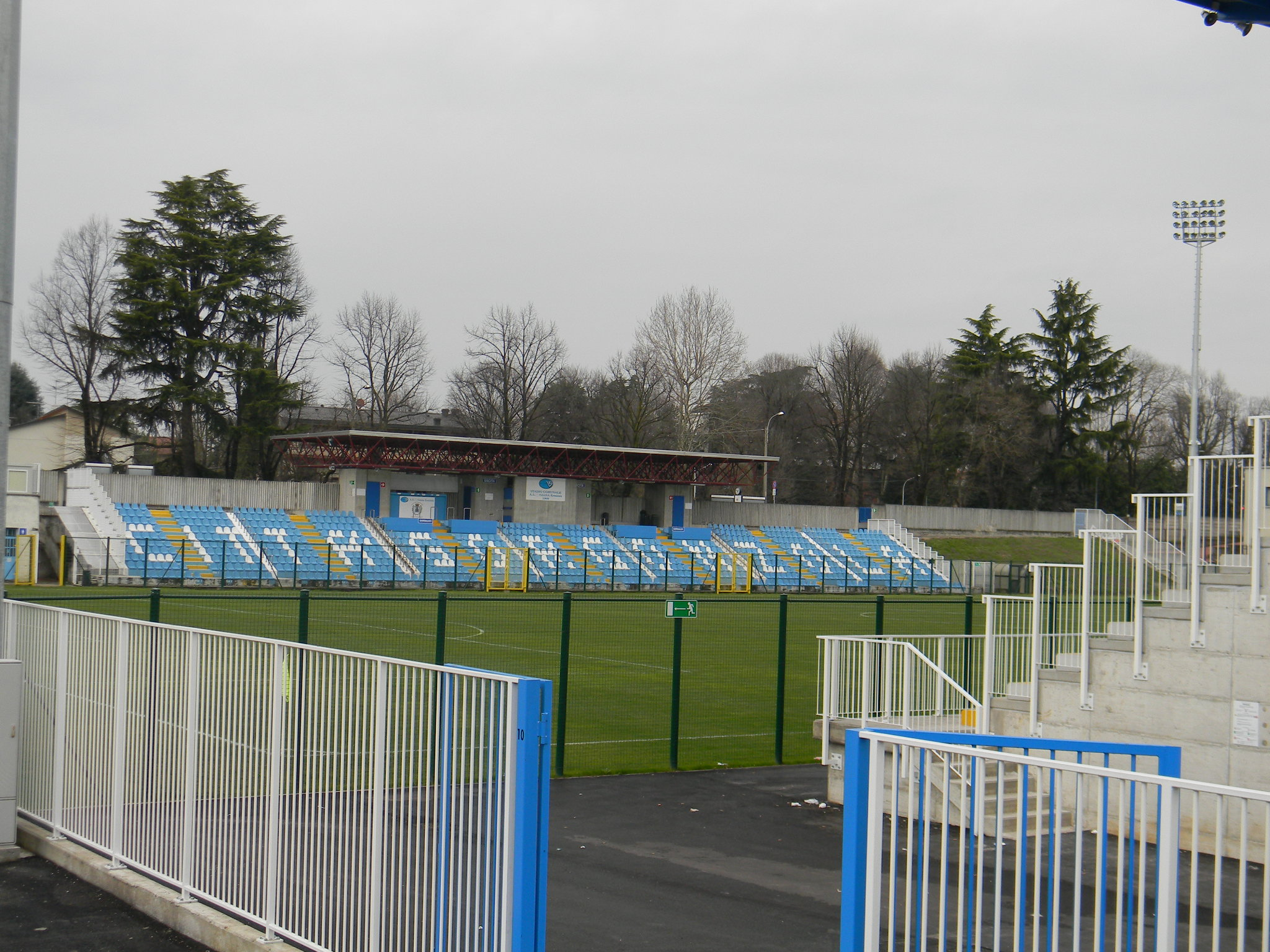 Vista sulla tribuna nord dello stadio comunale di Gorgonzola (MI)